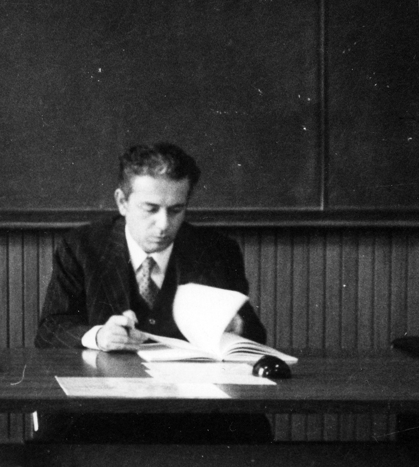 Fotografia del magistrato Vittorio Occorsio